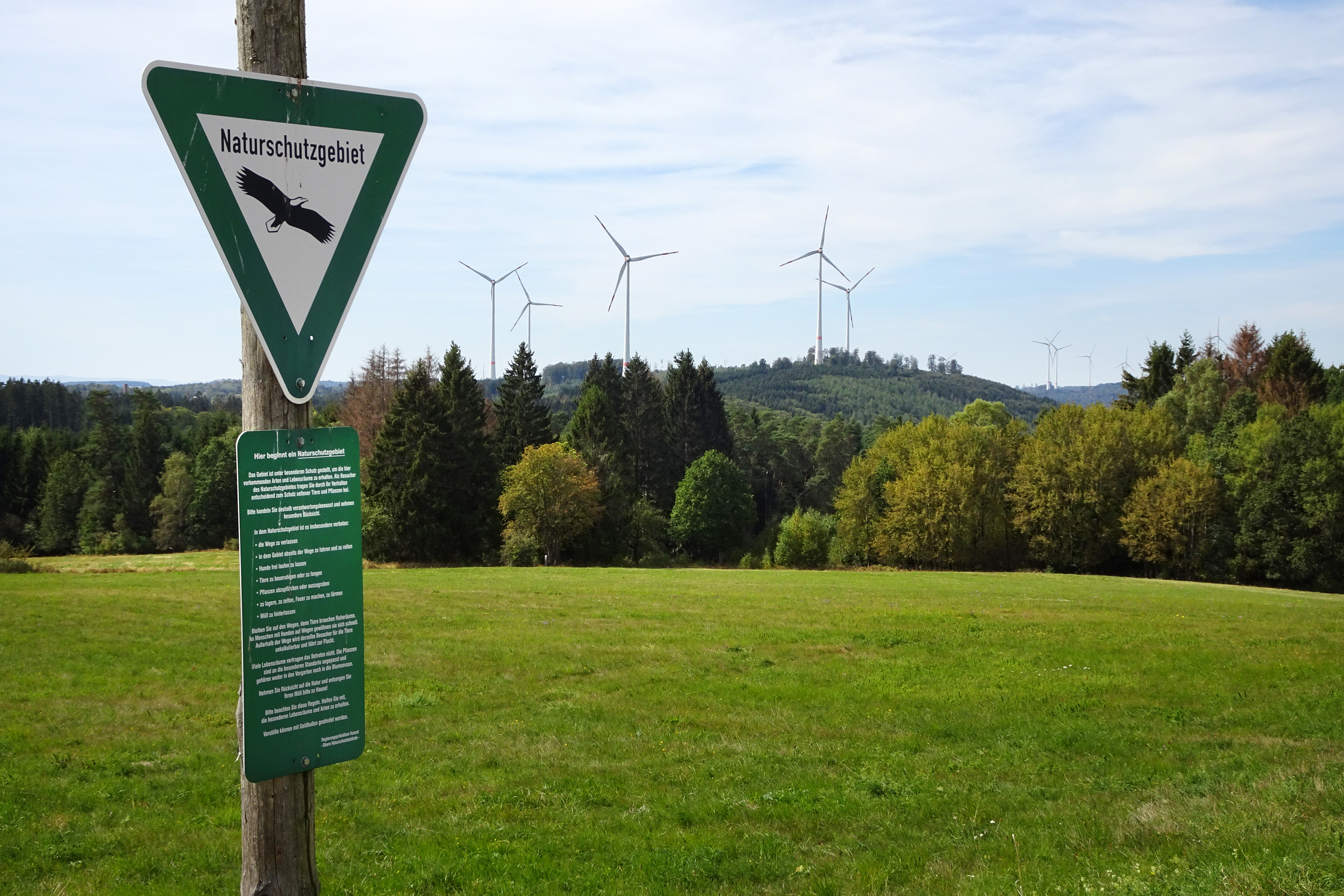 Die „Tiefenbachwiesen bei Rommerode“ sind extensiv genutzte Bergwiesen westlich des Ortes Rommerode im nordhessischen Werra-Meißner-Kreis. Die oft kleinen Parzellen wurden durch Hecken abgegrenzt und über Generationen gepflegt. Das bildete eine grenzlinienreiche Kulturlandschaft aus, deren Reste heute noch vorhanden sind. Als einen Bereich, der die Vielfalt an Lebensräumen im Grünland repräsentiert wurden Teile der Wiesen im März 1989 zum Naturschutzgebiet erklärt. Mit Erweiterungsflächen westlich und südlich des Hirschberges wurden sie unter dem Namen „Hirschberg- und Tiefenbachwiesen“ Teil des europaweiten Schutzgebietsnetzwerks „Natura 2000“.